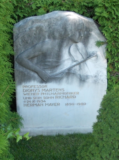 Dionys Martens-Feuerhalle Simmering (8-3-1-11)